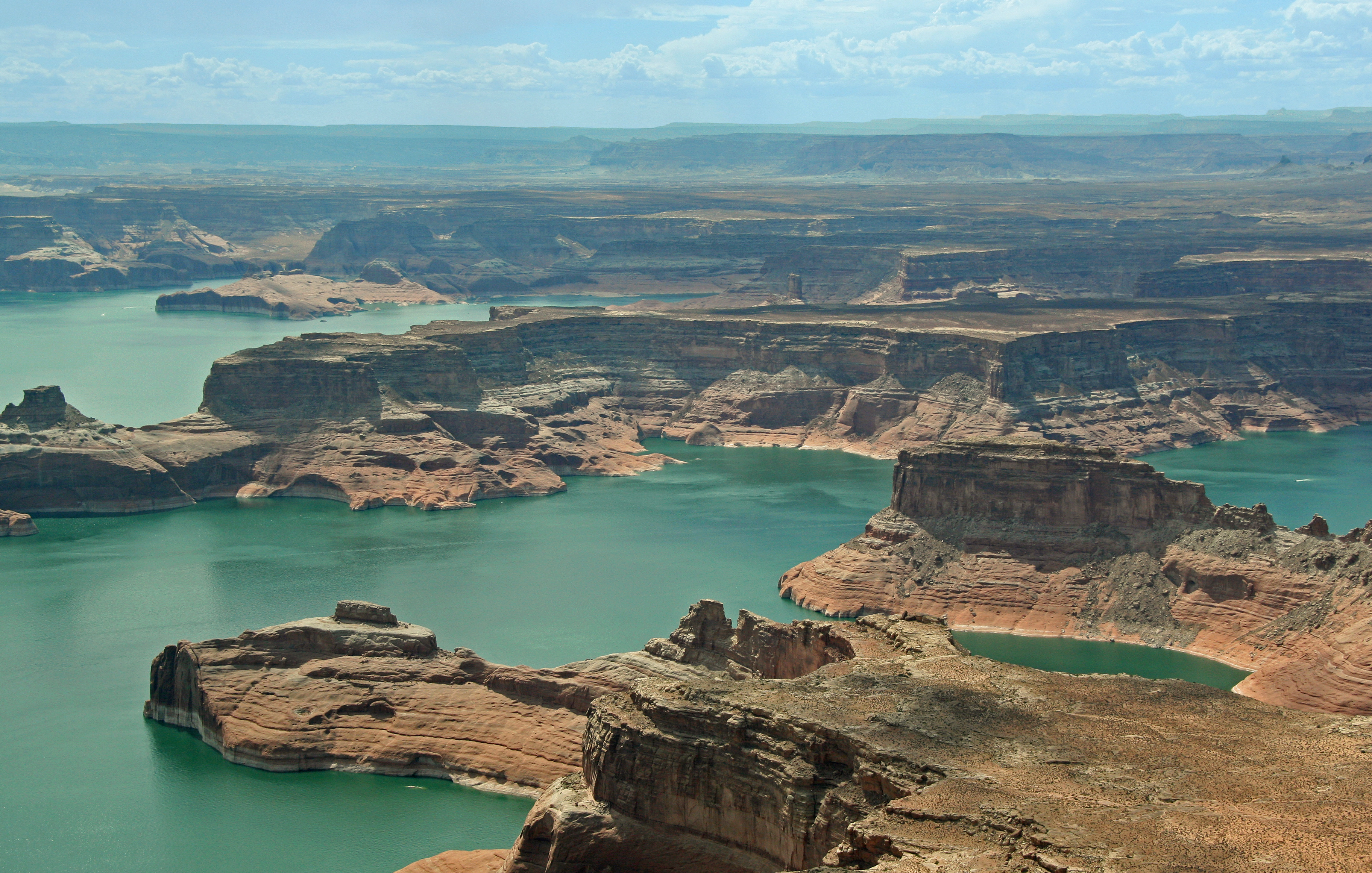 Vue aérienne sur le Lac Powell